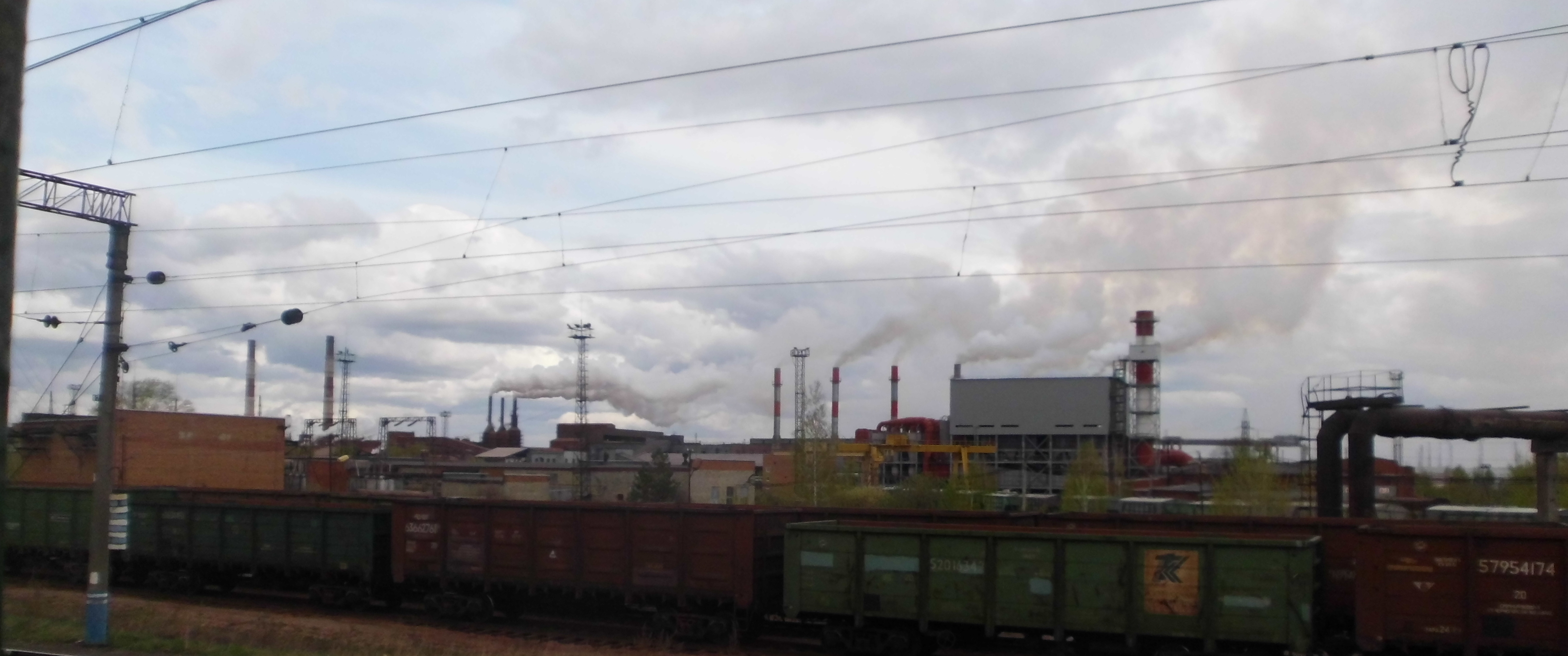 Железнодорожная станция УАЗ, Свердловская железная дорога, г. Каменс-Уральский, подъездные пути Уральского алюминиевого завода. На дальнем плане - Уральский алюминиевый завод. Россия